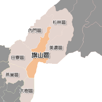 旗山區相對位置